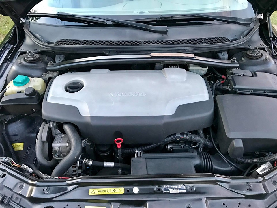 Variklis 2.4l. 136kW (185Ag)